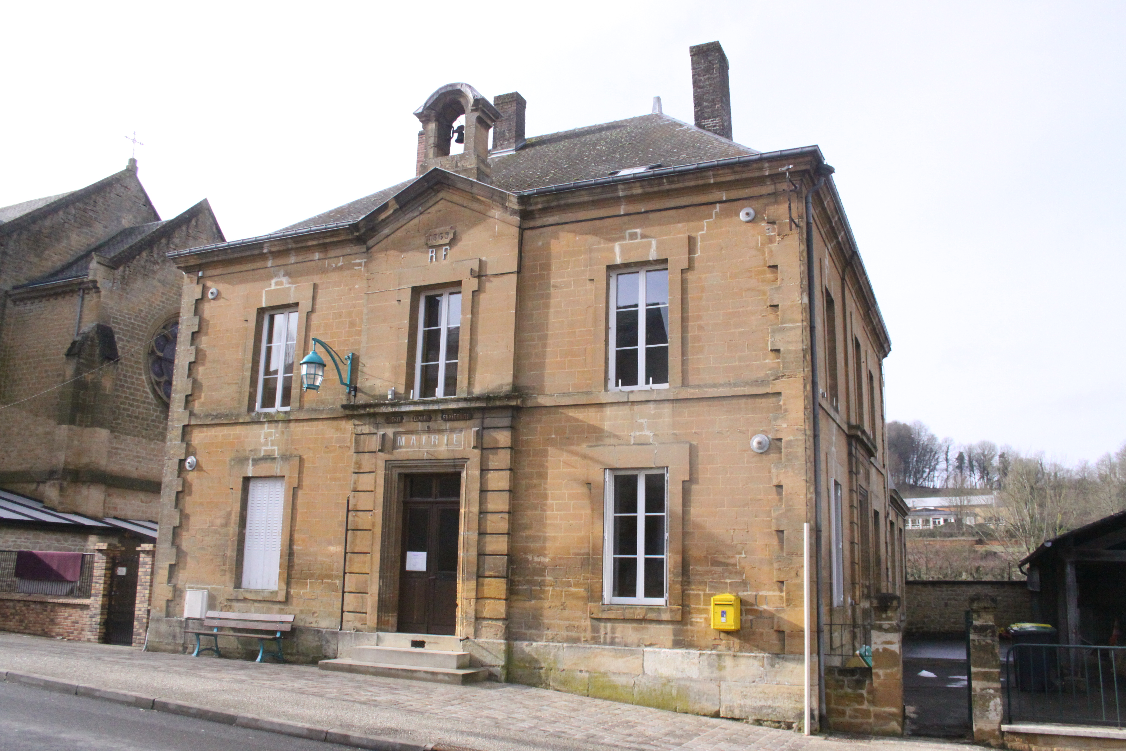 Village Ardennais